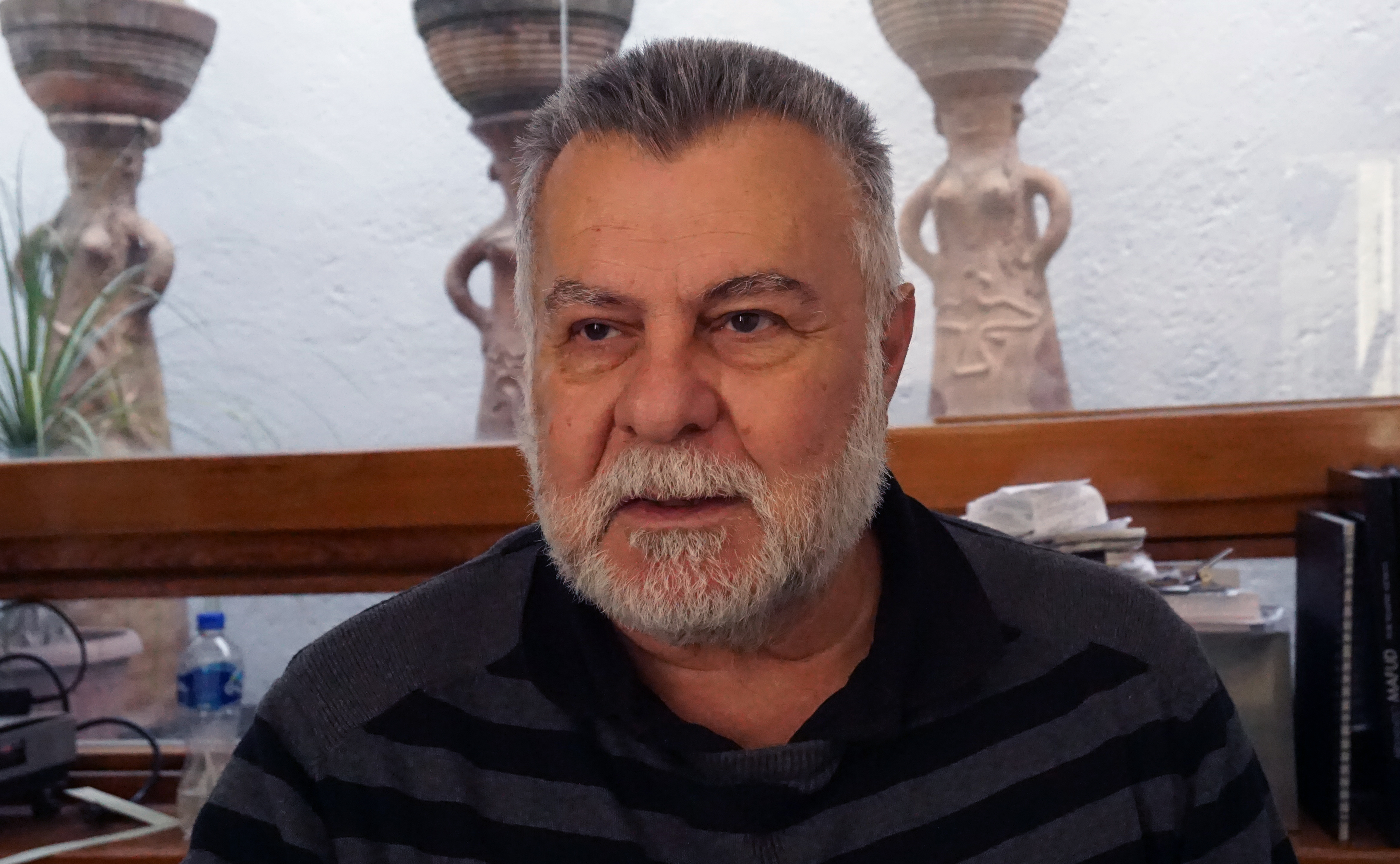 El diseñador mexicano Armando Mafud en su hogar en la Ciudad de México, 2018.